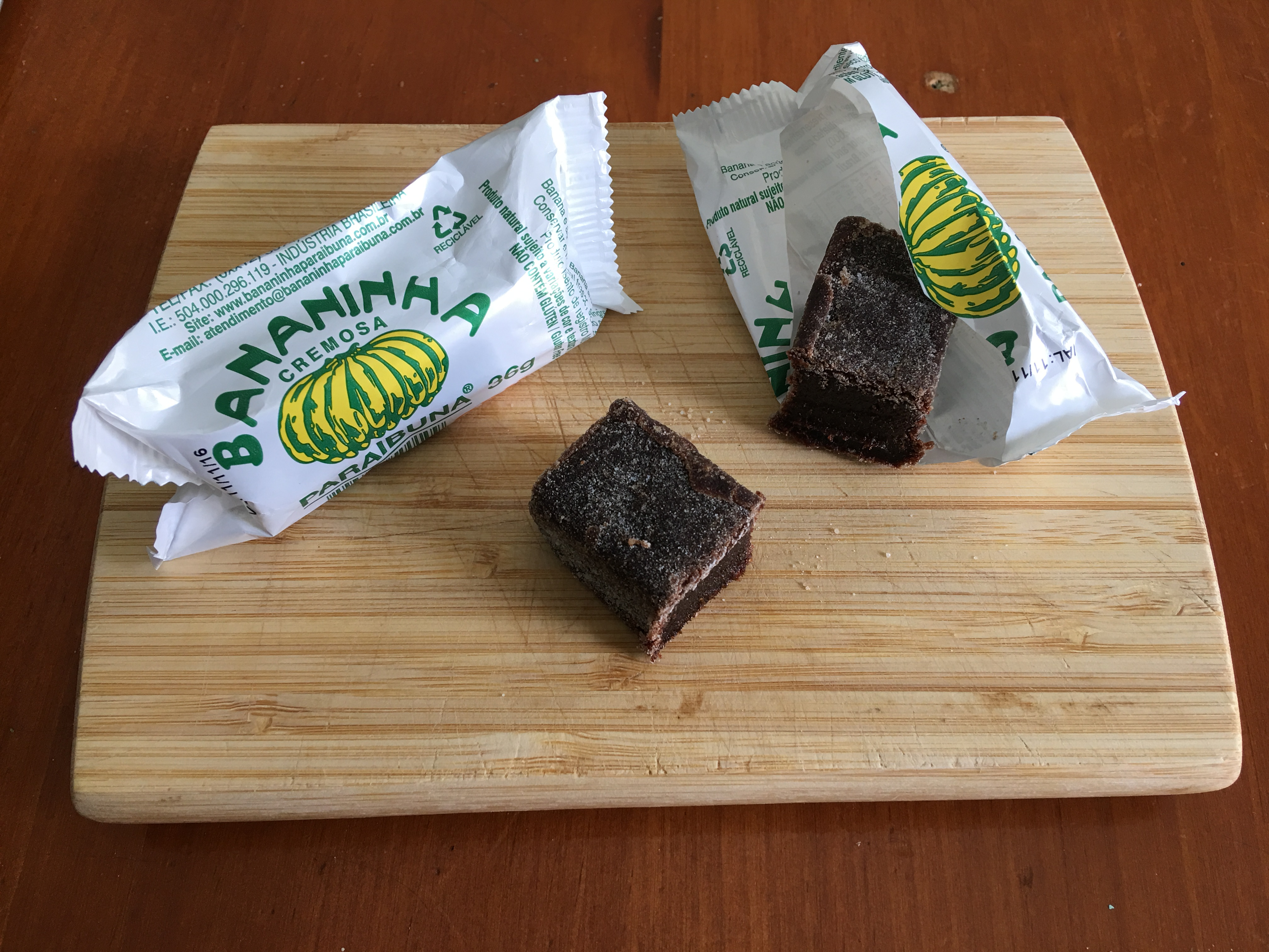 Bananinha cremosa